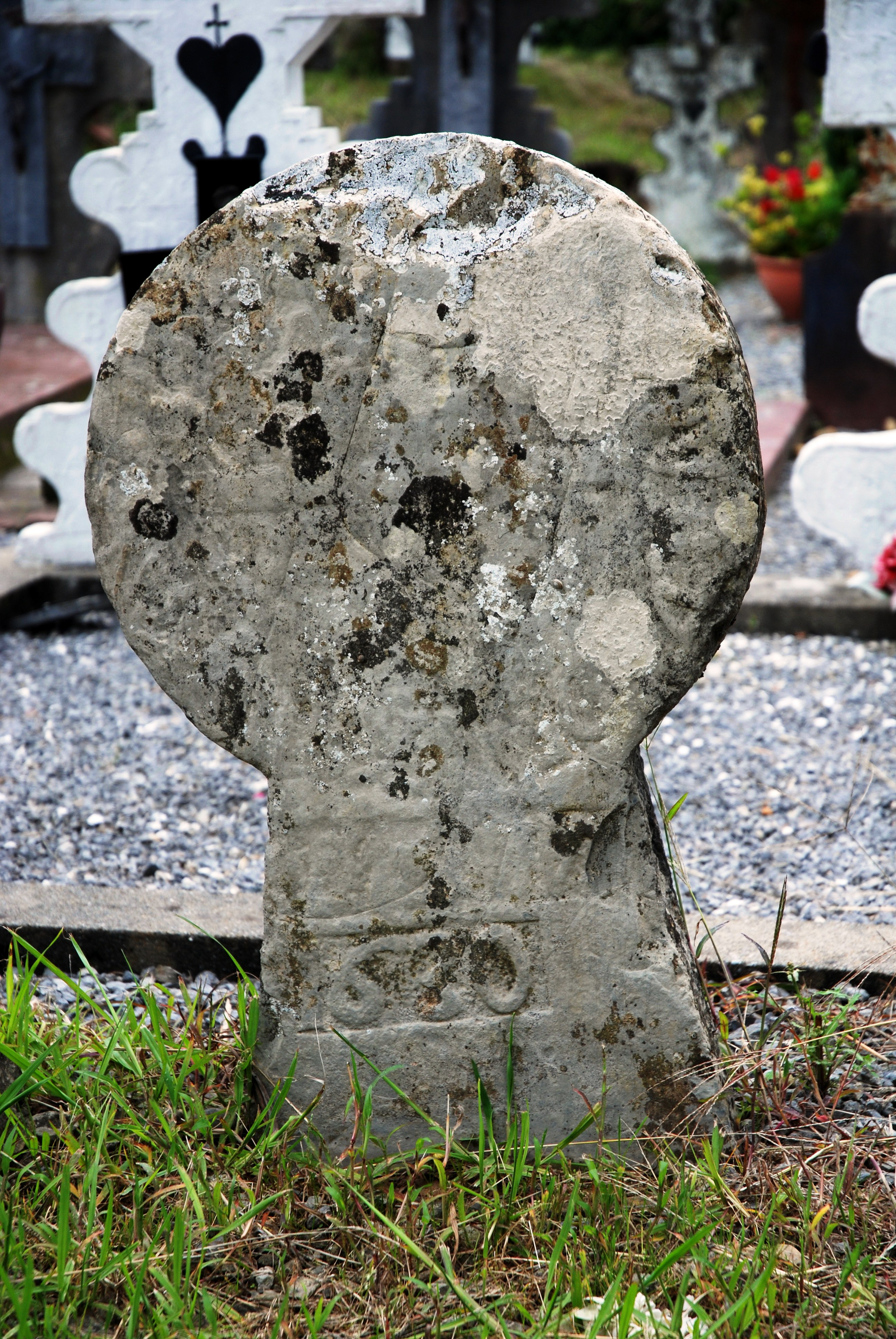 Lecumberry, stèle discoïdale